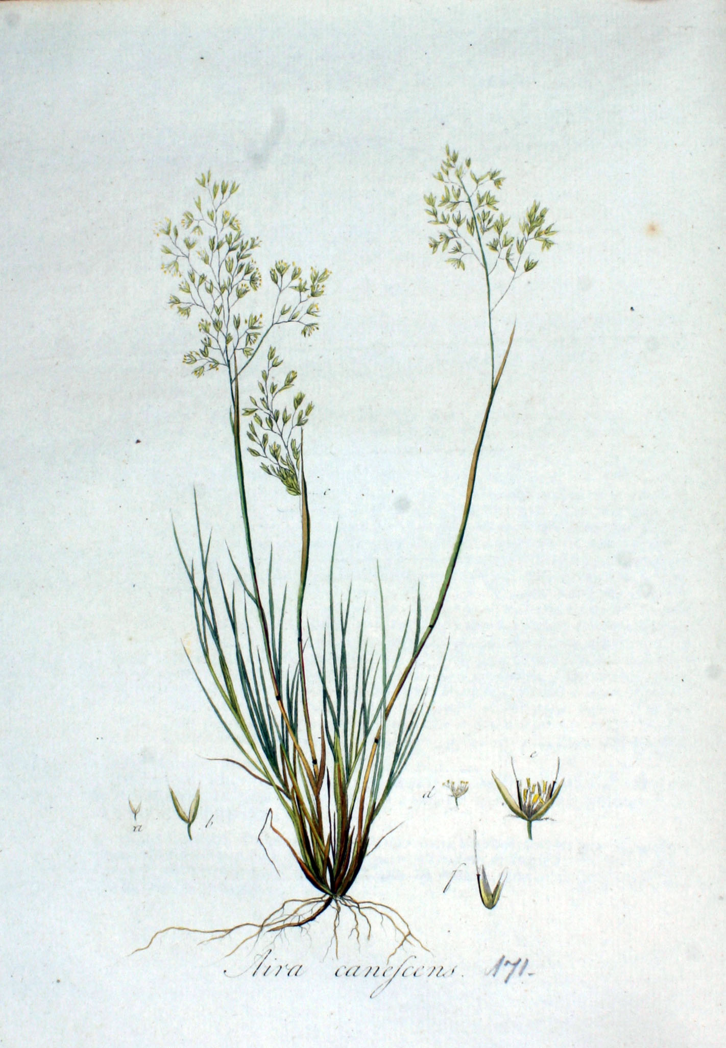 Corynephorus canescens (L.) P. Beauv. (Syn. Aira canescens L.